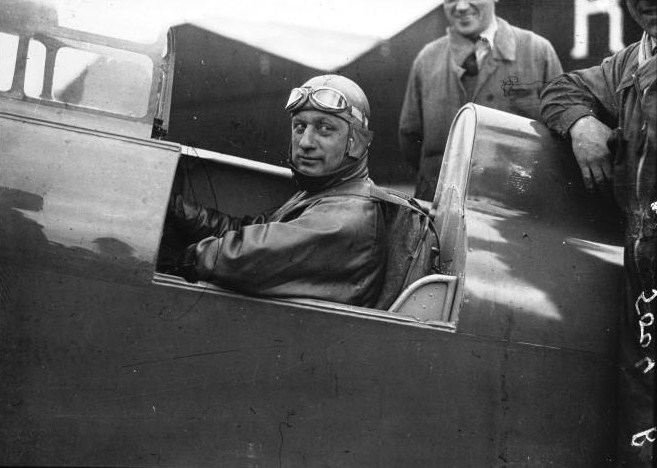 Portrait à 2 mètres de l'aviateur Raymond Delmotte lors d'essais à Etampes.